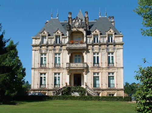 Château Lota à Ustaritz